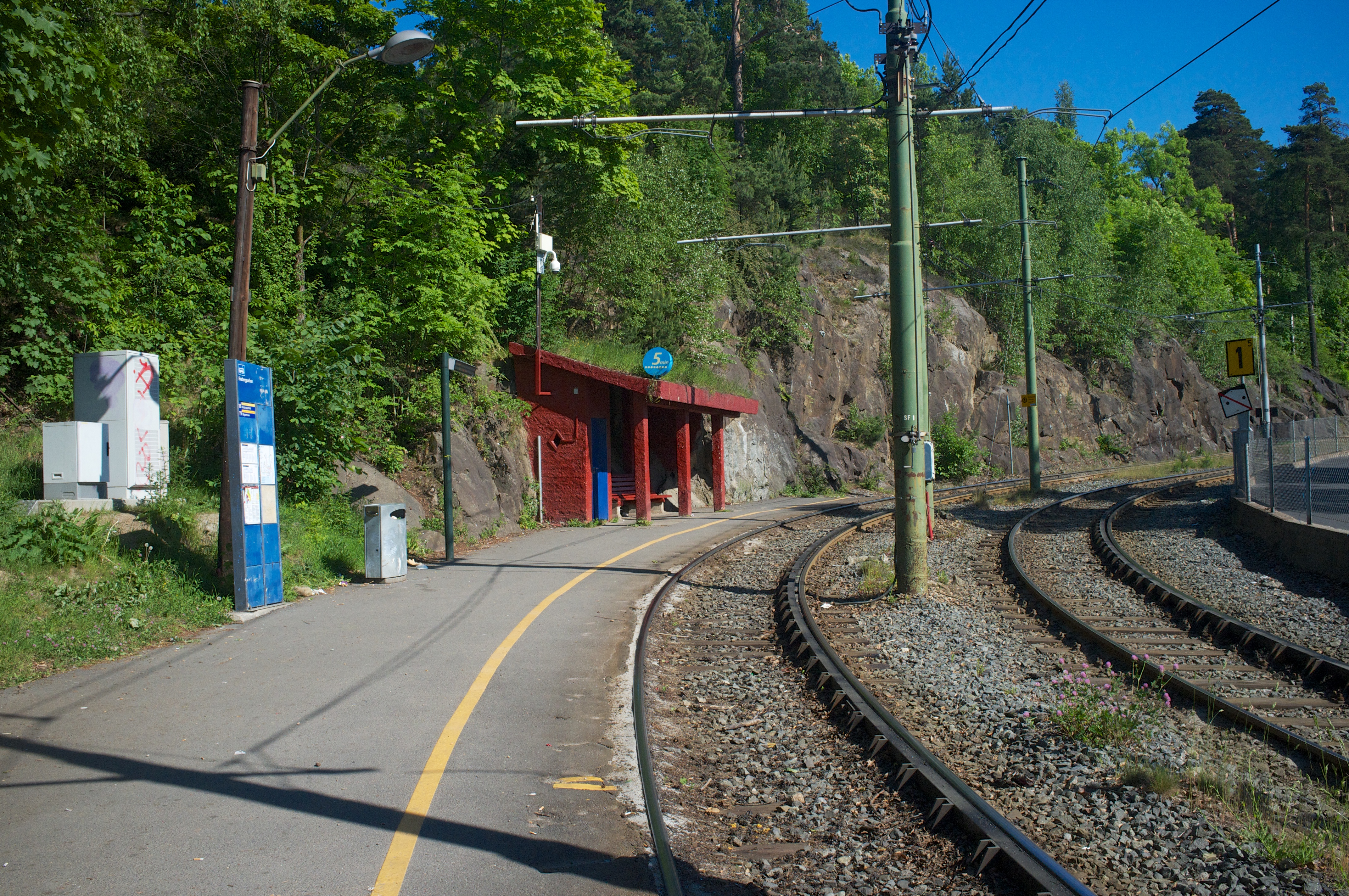 Ekebergparken holdeplass i Oslo.